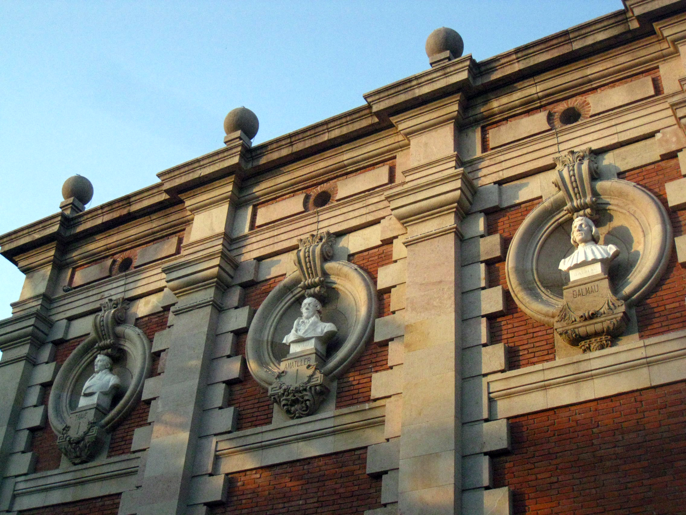 Palau del Parlament de Catalunya (Barcelona) Object location41° 23′ 16.47″ N, 2° 11′ 19.04″ E